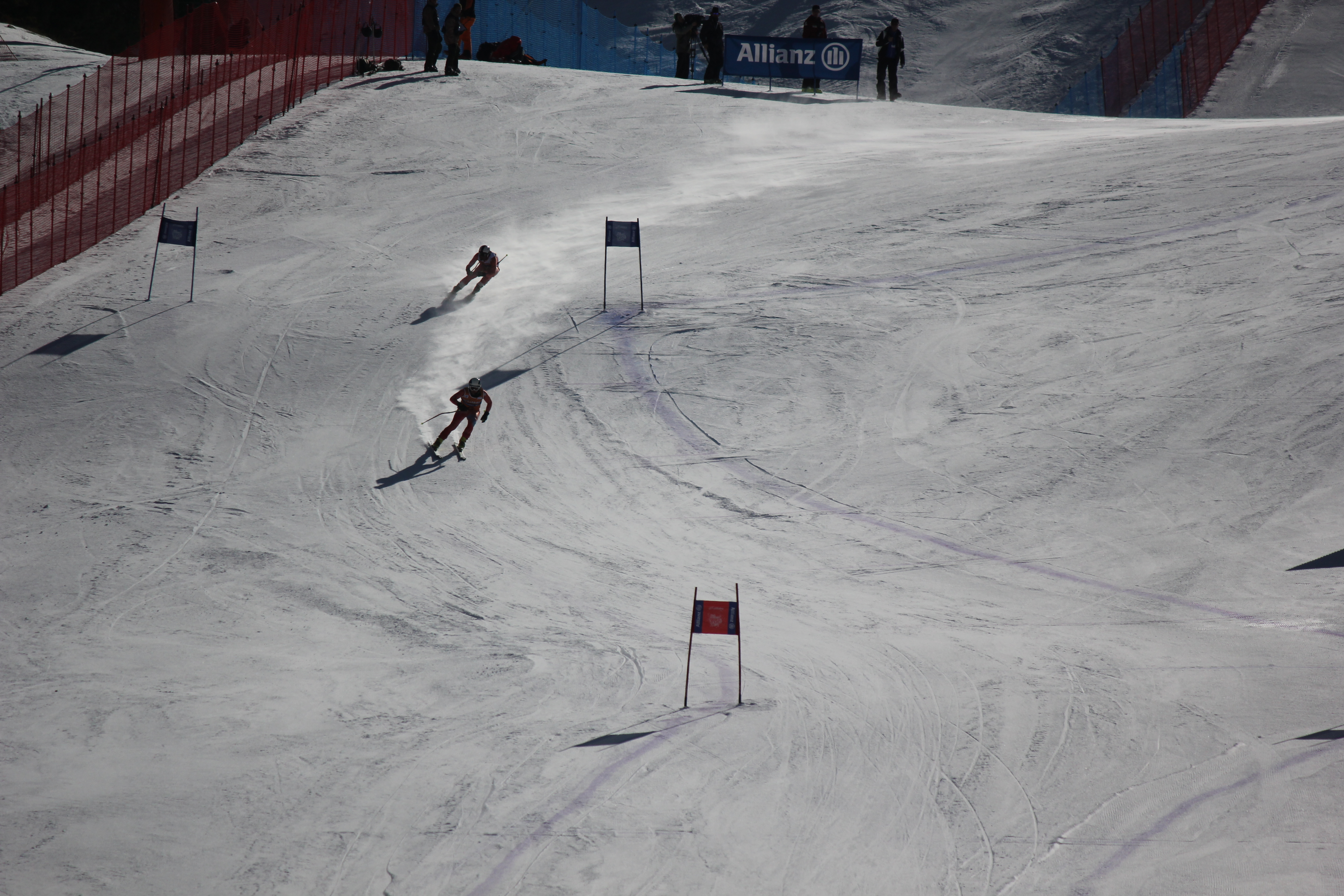 Arnau Ferrer -guía- y Gabriel Gorce durante la prueba de Super-G en el Campeonato del Mundo IPC de Esquí Alpino celebrado en La Molina, España. 2013.